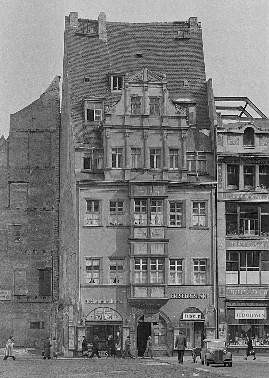 Original image description from the Deutsche Fotothek Vorderansicht von Häusern auf der Reichsstraße, u.a. des Riquethauses